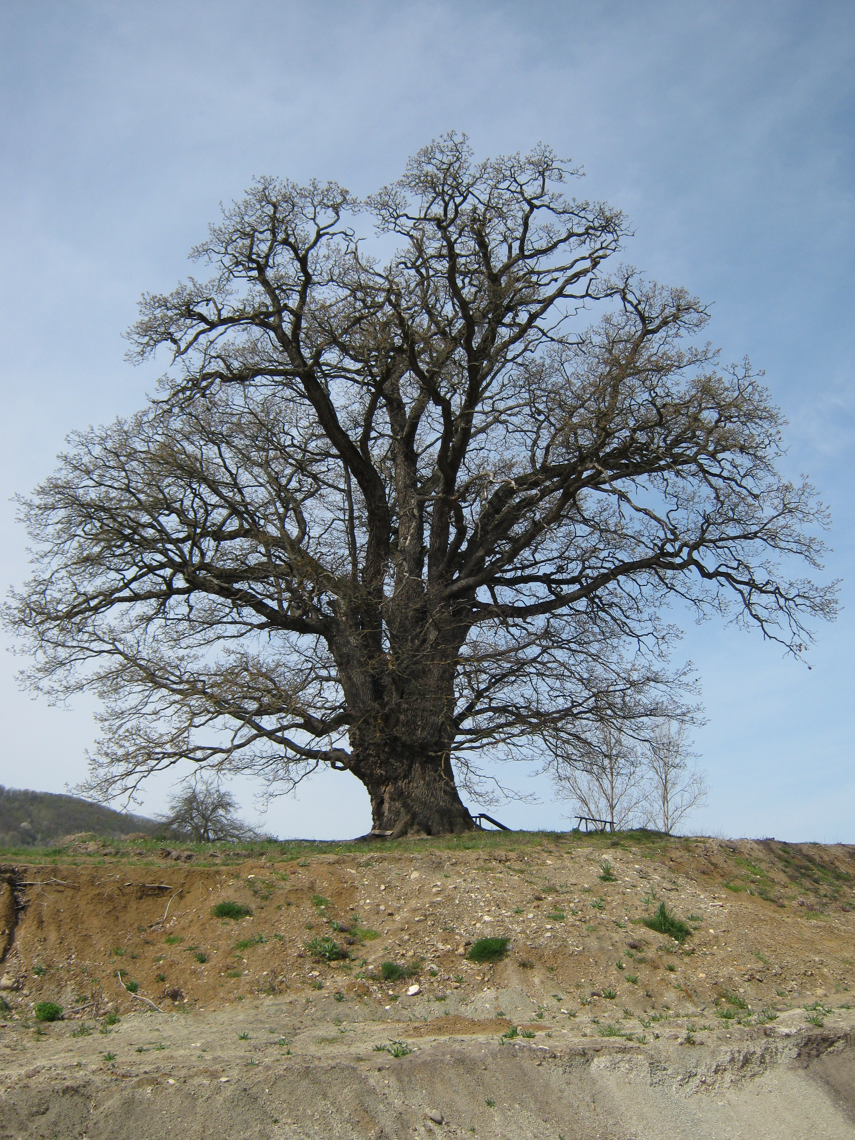 Запис чија је старост процењена на 600 година, у месту Росуље, село Шарани.